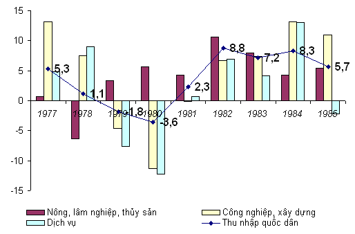 Tốc độ tăng trưởng thu nhập quốc dân thực tế hàng năm (dựa theo giá so sánh 1982) của nền kinh tế và các ngành lớn. Đơn vi: phần trăm. Nguồn số liệu để vẽ hình này là Bảng 7.1 trang 293 trong Trần Văn Thọ chủ biên (2000), Kinh tế Việt nam 1955-2000: Tính toán mới, phân tích mới, Nhà xuất bản Thống kê, Hà Nội.